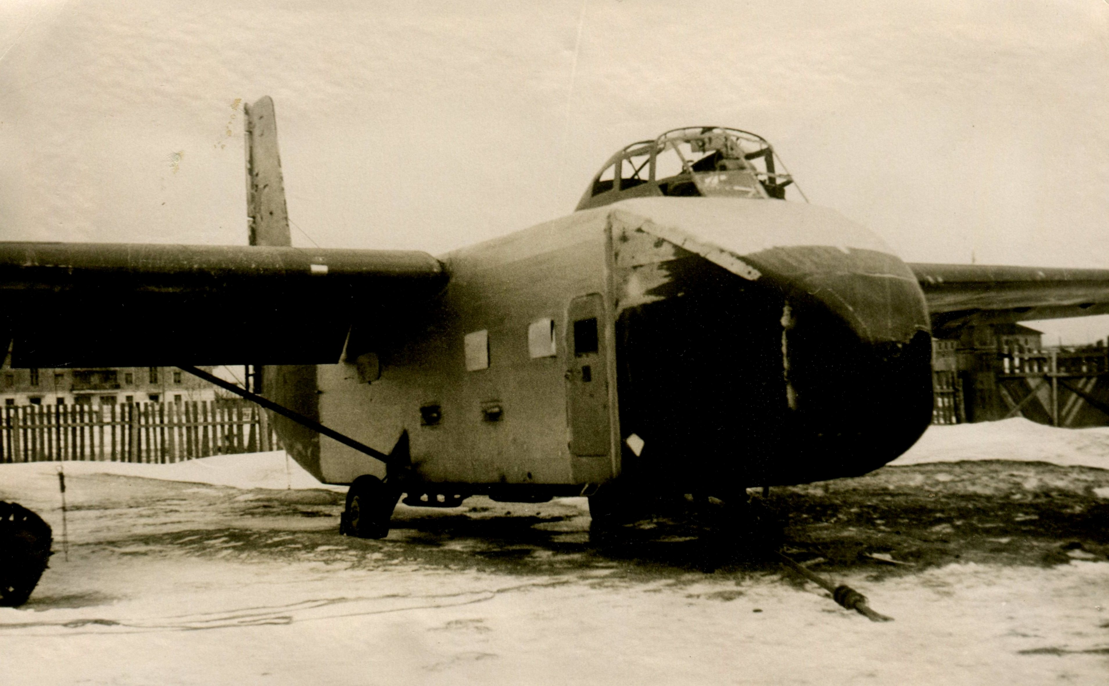 Як-14 фото Фетисова Юрия Николаевича.